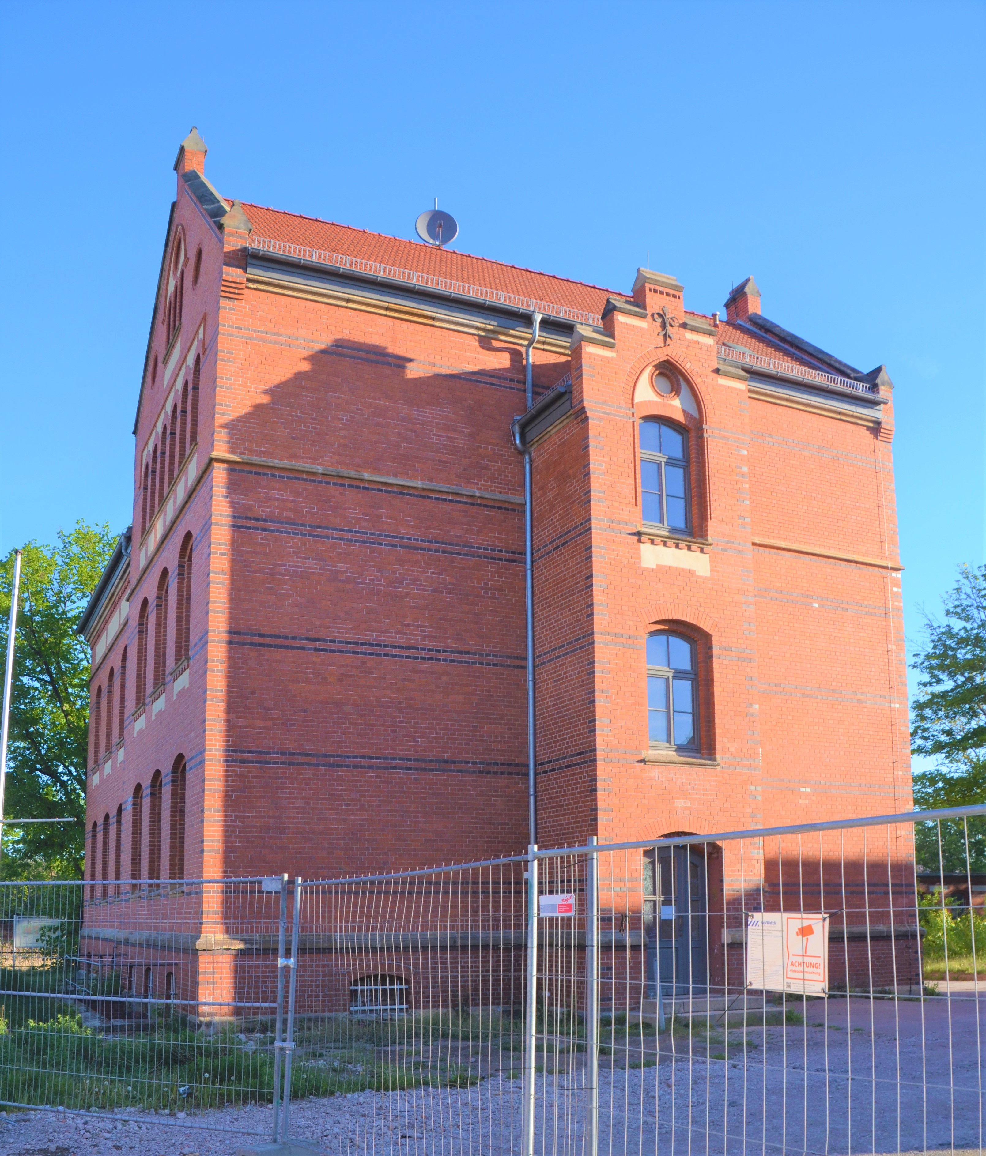 Willy-Brandt-School Erfurt der Uni Erfurt auf dem Gelände des Heliosklinikums Erfurt von Süden, von der Nordhäuser Straße